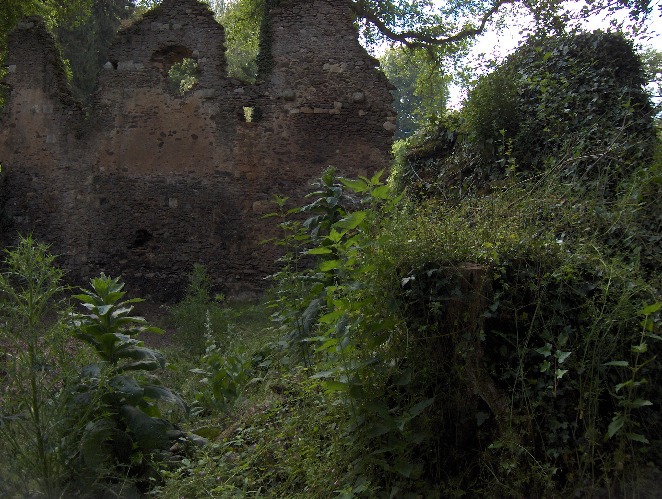 vestiges du cloître Ruine de l'abbaye des Pères à Fr:Sidiailles (Cher, Fr)